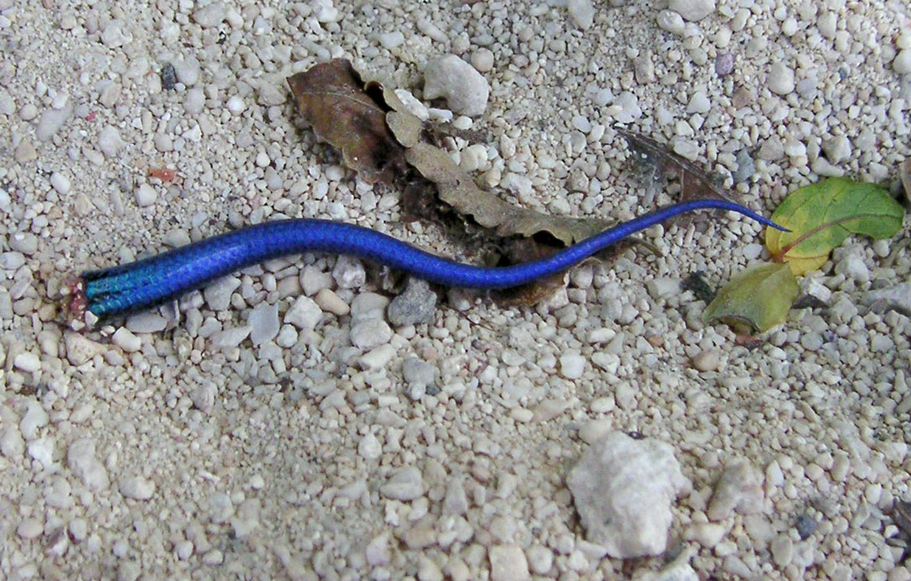 Lizard tail autotomy / 自切したイシガキトカゲのしっぽ